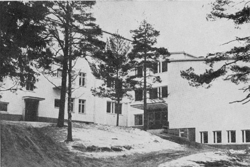 Etelä-Espoon yhteiskoulun (nyk. Haukilahden koulu ja Lukio) Jorvaksentien (nyk. Länsiväylä) puoleinen pääsisäänkäynti. Koulun pääsisäänkäynti on ollut rakennuksen toisella puolella vuodesta 1963, kun koulun liikenne siirtyi Länsiväylältä sen eteläpuolella olevalle Koulutanhualle.